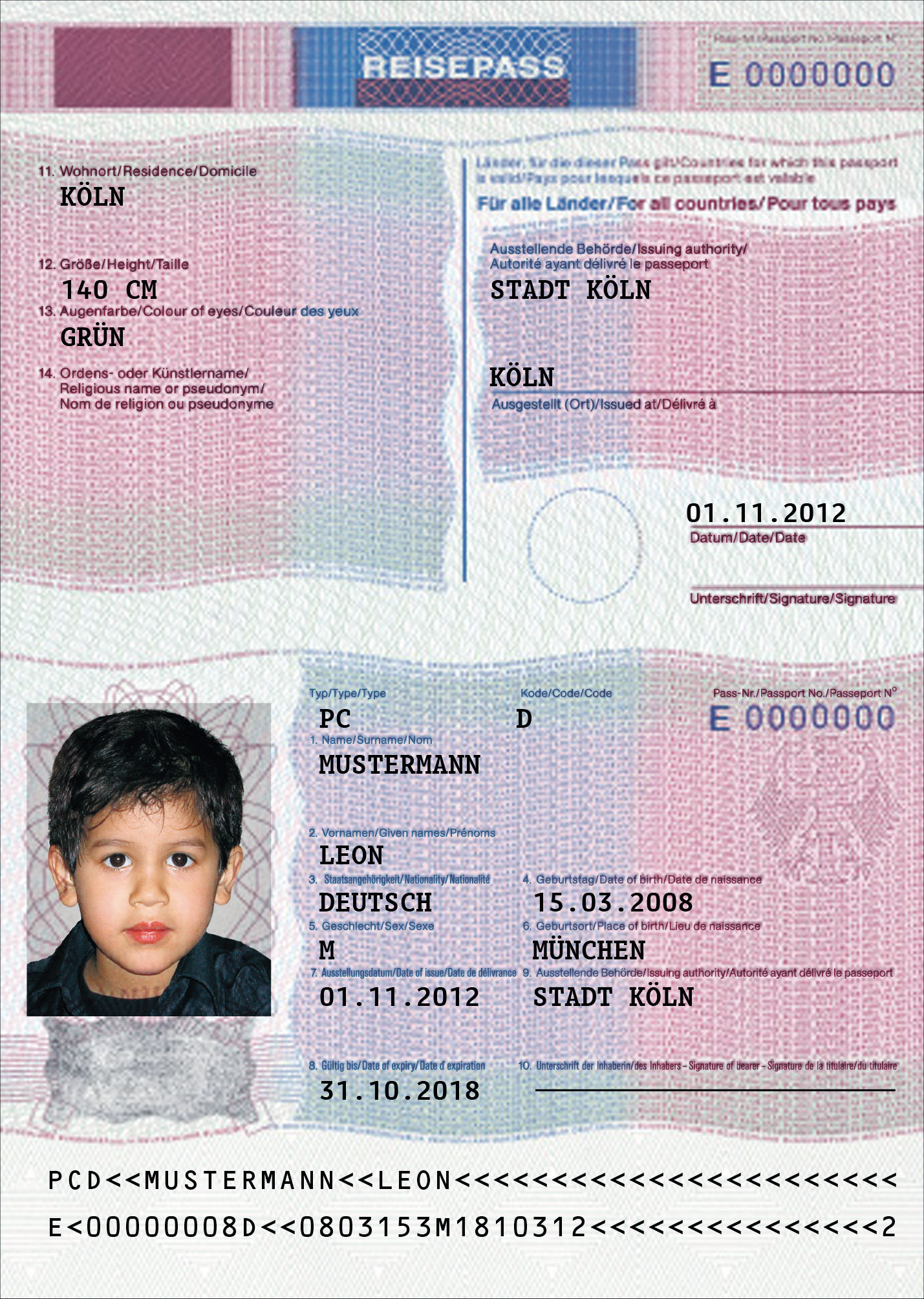 Deutscher Kinderreisepass (Muster 2013)